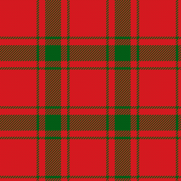 R/60 G4 R10 G/26